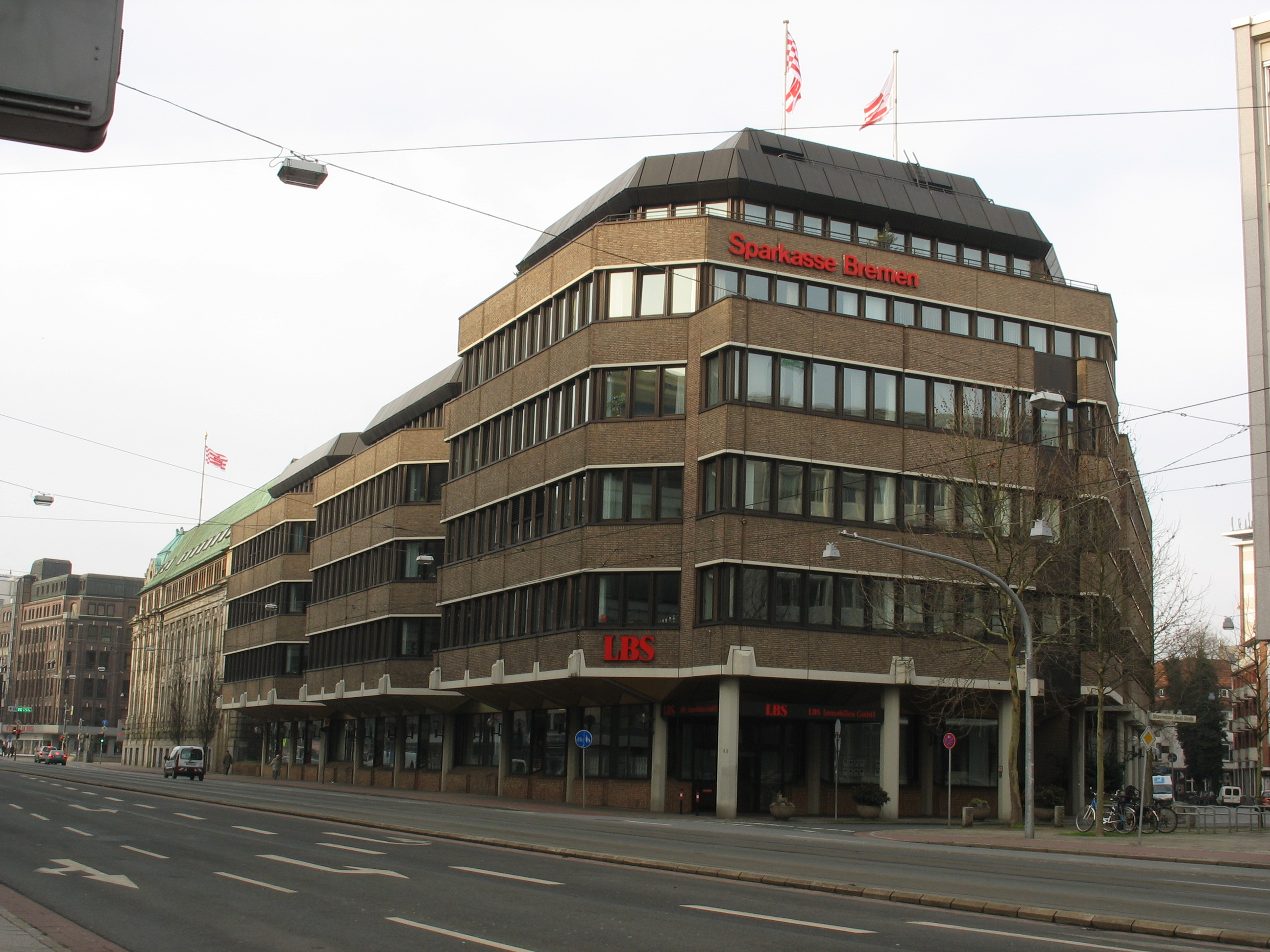 Sparkasse Bremen Hauptstelle Gebäuderückseite